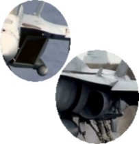 Luchtinlaat van een F/A-18E/F Super Hornet en van een F/A-18 Hornet Air intake of an F/A-18E/F Super Hornet and an F/A-18 Hornet